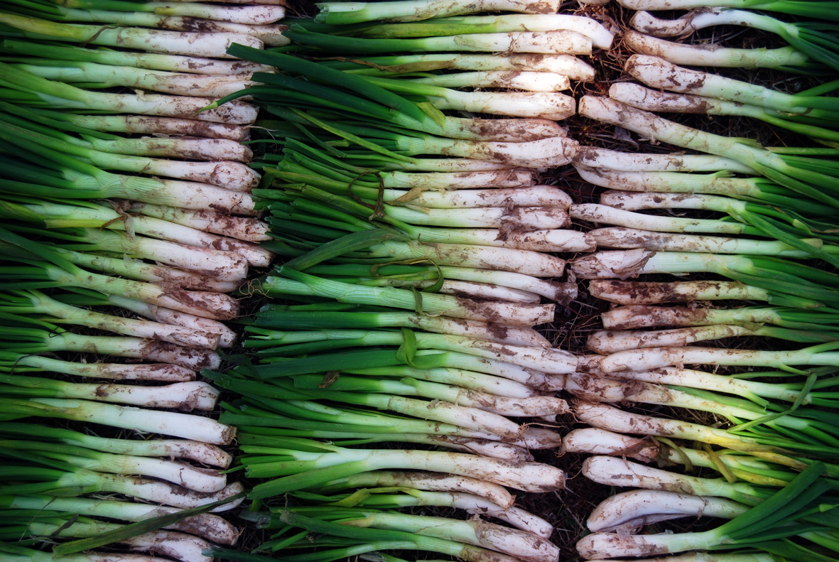 Paret de calçots.